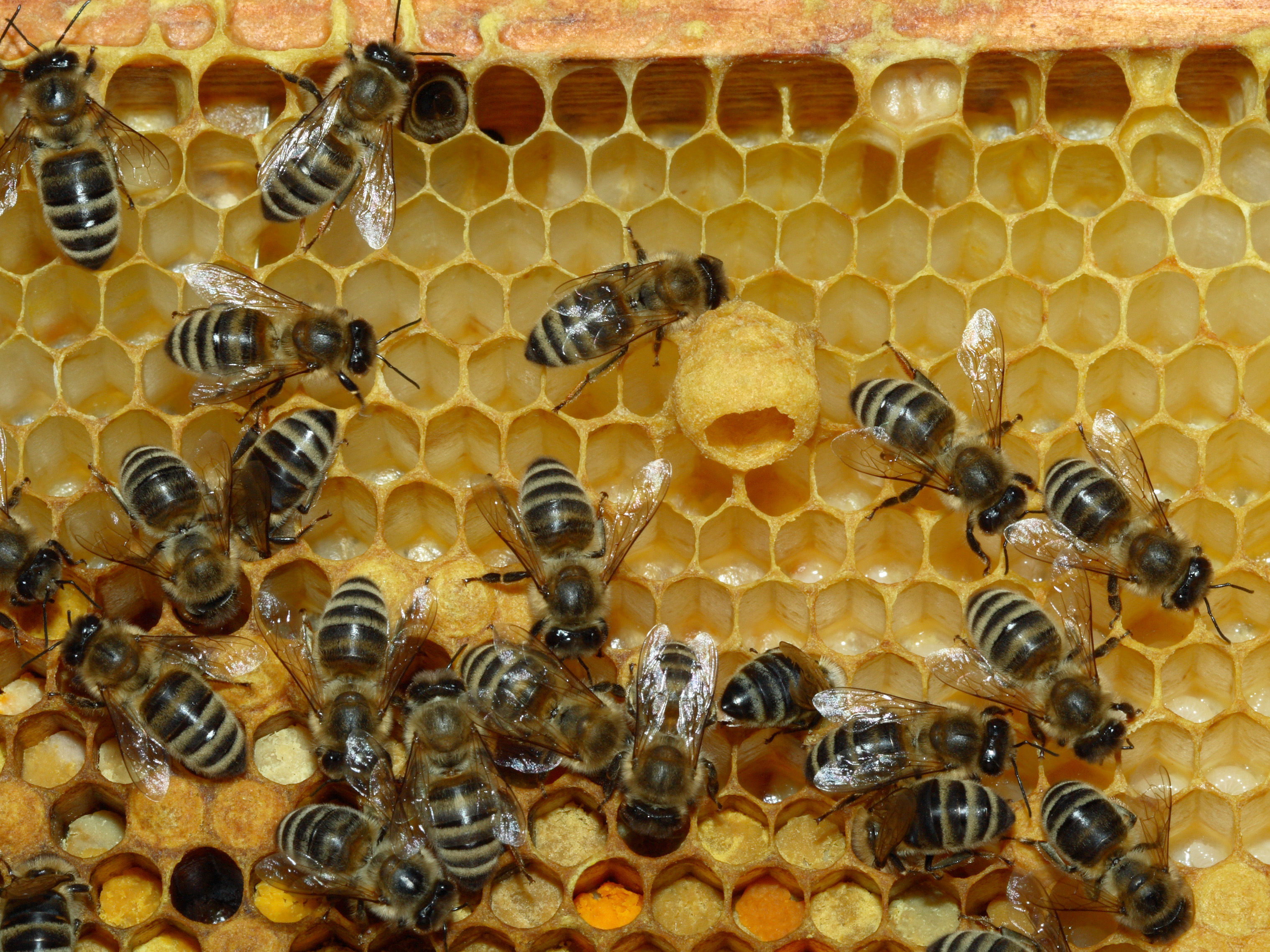 Noch leeres Weiselnäpfchen am Rande einer Bienenwabe. Legt die Königin dort ein Ei hinein, wird die schlüpfende Larve so gefüttert, dass eine Königin heranwächst.